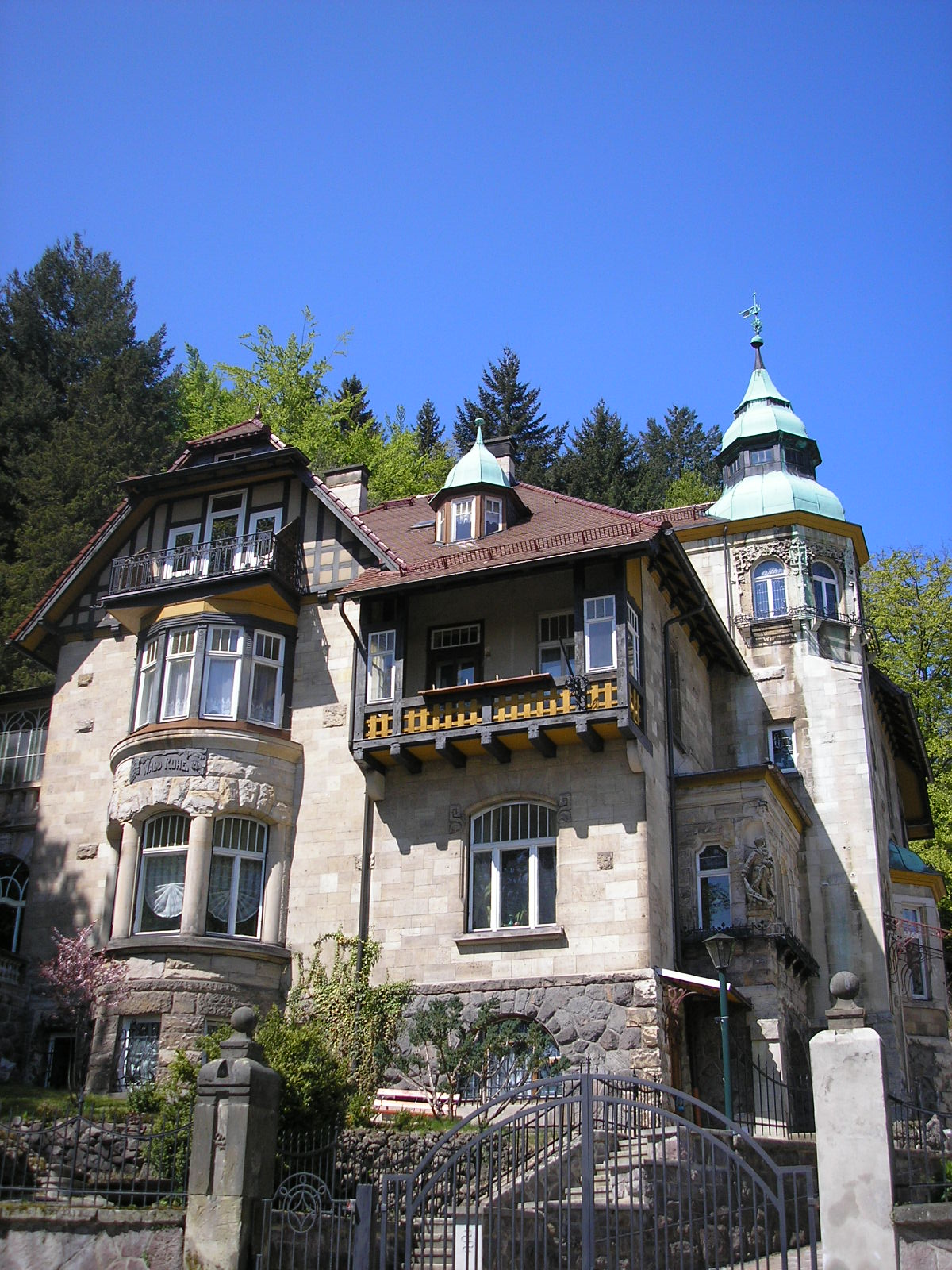 Eine Villa im Kurviertel von Ilmenau (Thüringen).